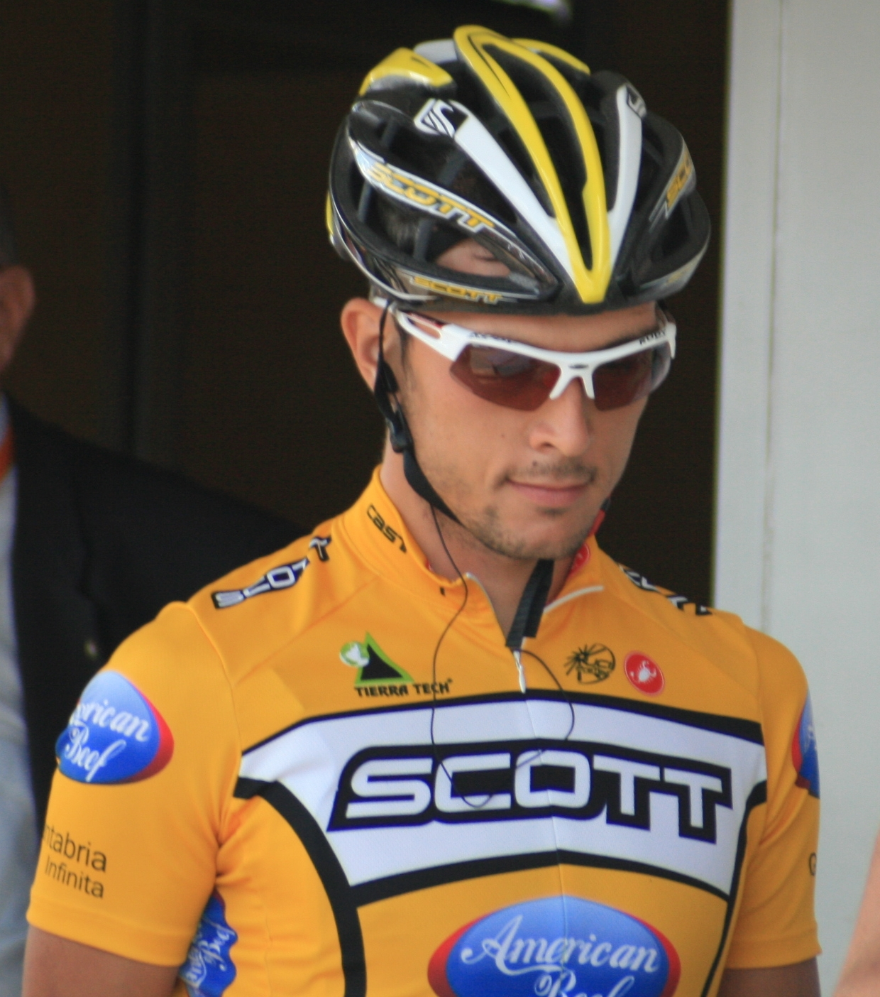 Rubens Bertogliati, à l'Eneco Tour 2008, à Ardooie